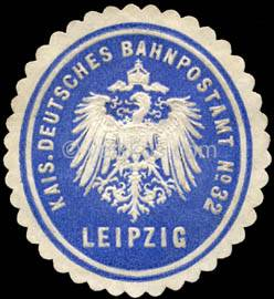 Das ist eine original Ablichtung einer Siegelmarke des Kaiserlichen Deutschen Bahnpostamtes No. 32 (Leipzig).